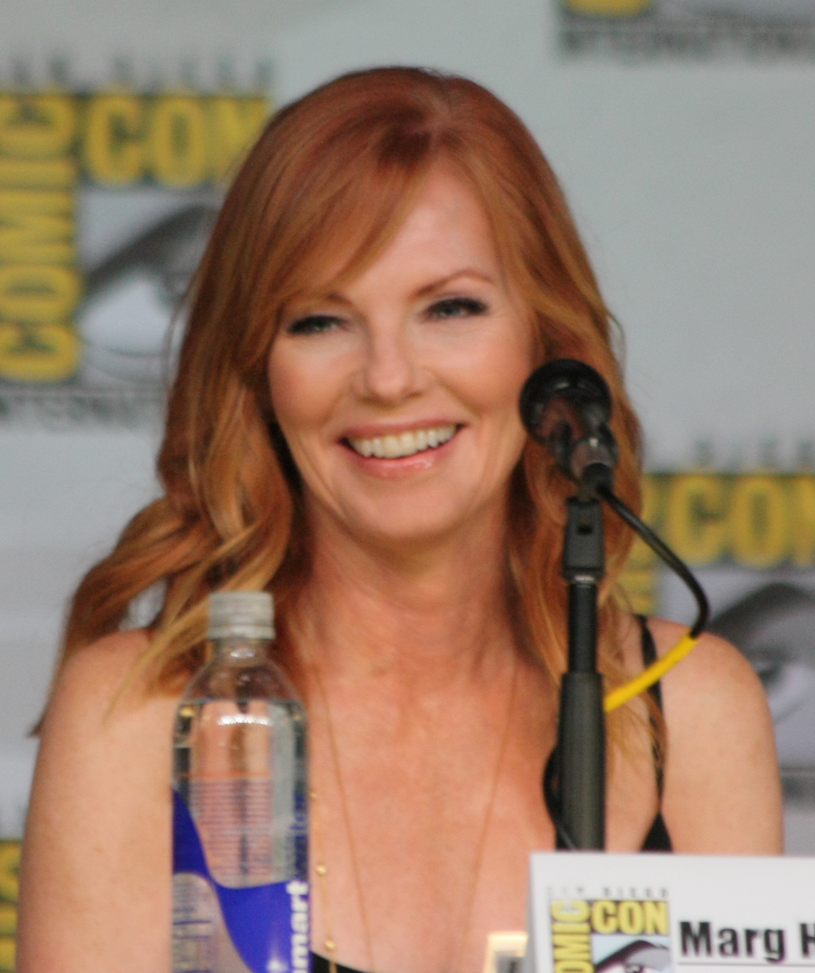 Marg Helgenberger (Lillian)